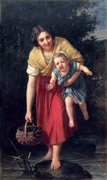 Jeune mère et son enfant par Alexandre-Jacques Chantron, 1879, 173 x 103 cm